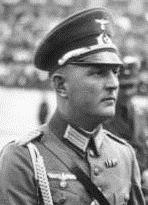 Major Friedrich Hossbach (Mitte), der Adjudant des Führers (Aufnahme: 1934) 34725-34